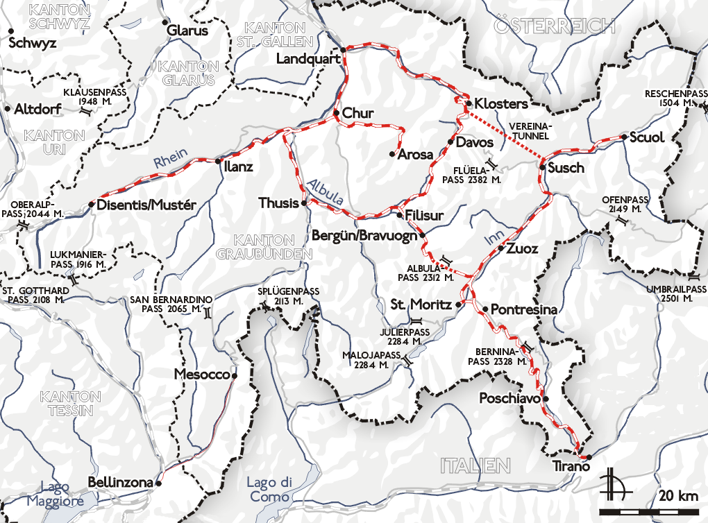 Darstellung zeigt dsa Netz der Rhätischen Bahn. Zeichnung erstellt 2004 von Benutzer:Sansculotte. Bild ist unter der GNU FDL zur weiteren Verwendung freigegeben. Quellenangabe und Beleg an erbeten.